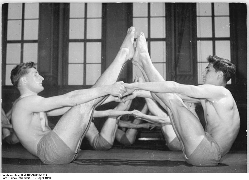 Leipzig, DHfK, Gymnastik Zentralbild Funck,Wendorf-Bay-Qu 19.4.1956 DHfK für das II. Deutsche Turn- und Sportfest. Auch die Deutsche Hochschule für Körperkultur (DHfK) in Leipzig wird in der zeit vom 2. bis 5. August 1956 wesentlich zum Gelingen des II. Deutschen Turn- und Sportfestes beitragen. Die jungen Studenten haben einige Übungen einstudiert, die sie vor den 100.000 in Leipzig zeigen werden. Über 700 Sportler der DHfK werden die Zuschauer mit ihren Reifenübungen, Gymnastikübungen usw. erfreuen. UBz: Ein Ausschnitt aus den Boden-Gymnastikübungen der Leipziger Studentinnen.